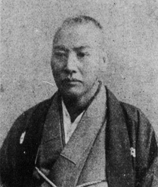 海野勝眠(1844-1915)